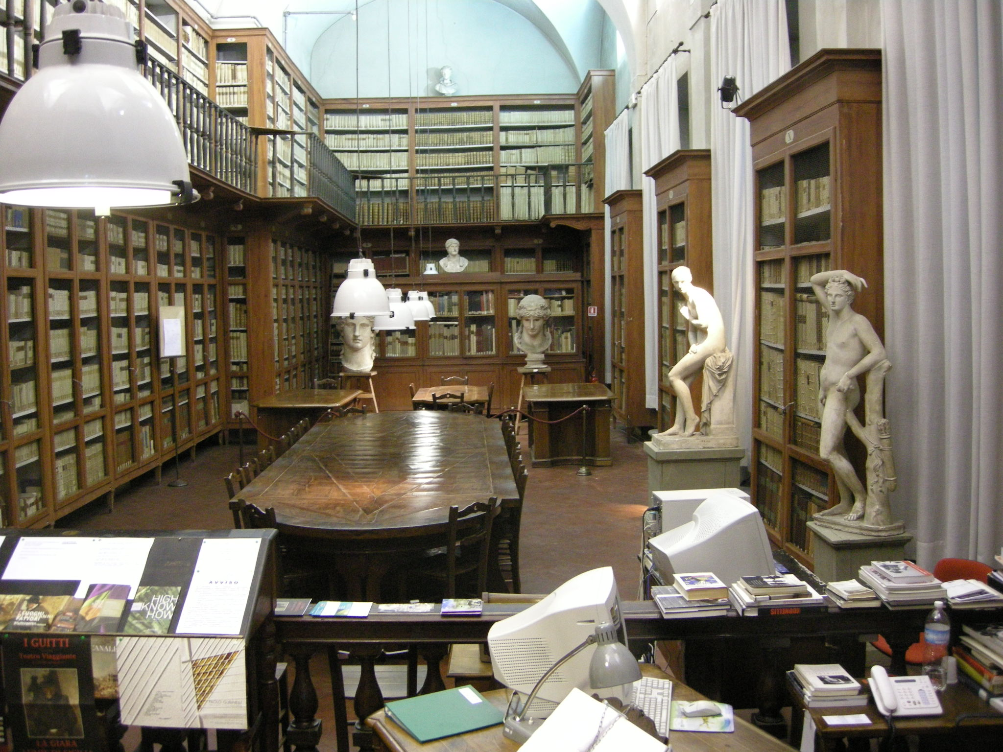 Accademia di firenze, biblioteca 03